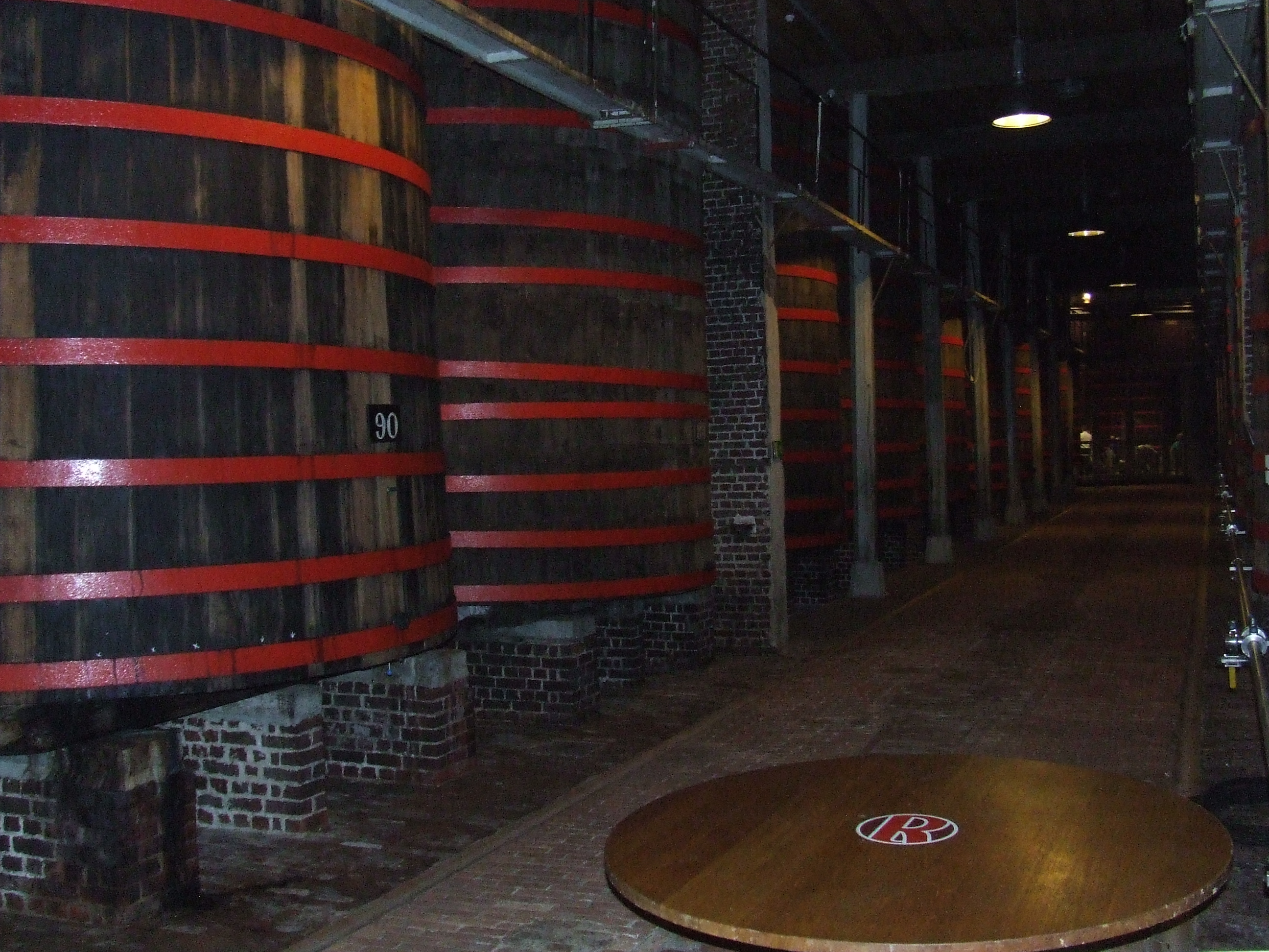 Brouwerij Rodenbach Spanjestraat 133-141 8800 Roeselare